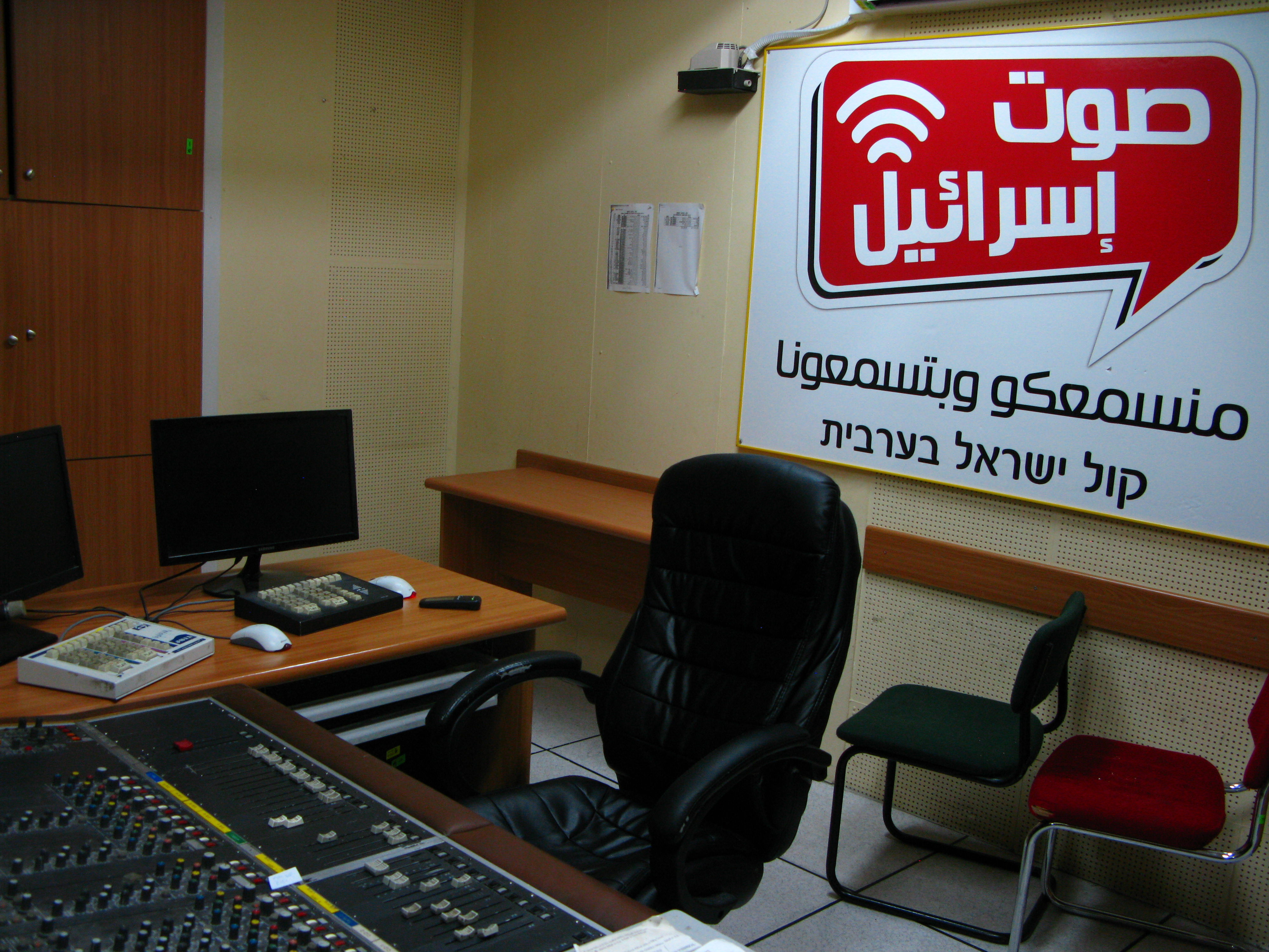 בניין קול ישראל ברחוב הלני המלכה בירושלים, משמש את תחנת הרדיו "קול ישראל" מאז ימי הרדיו המנדטורי ב-1939, ולסגירת רשות השידור.